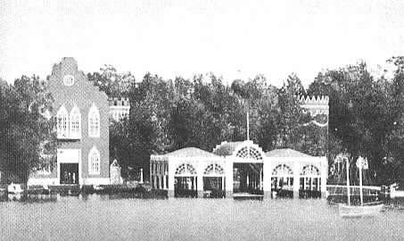 Царскосельское Адмиралтейство с разобранным в 1919 году причалом